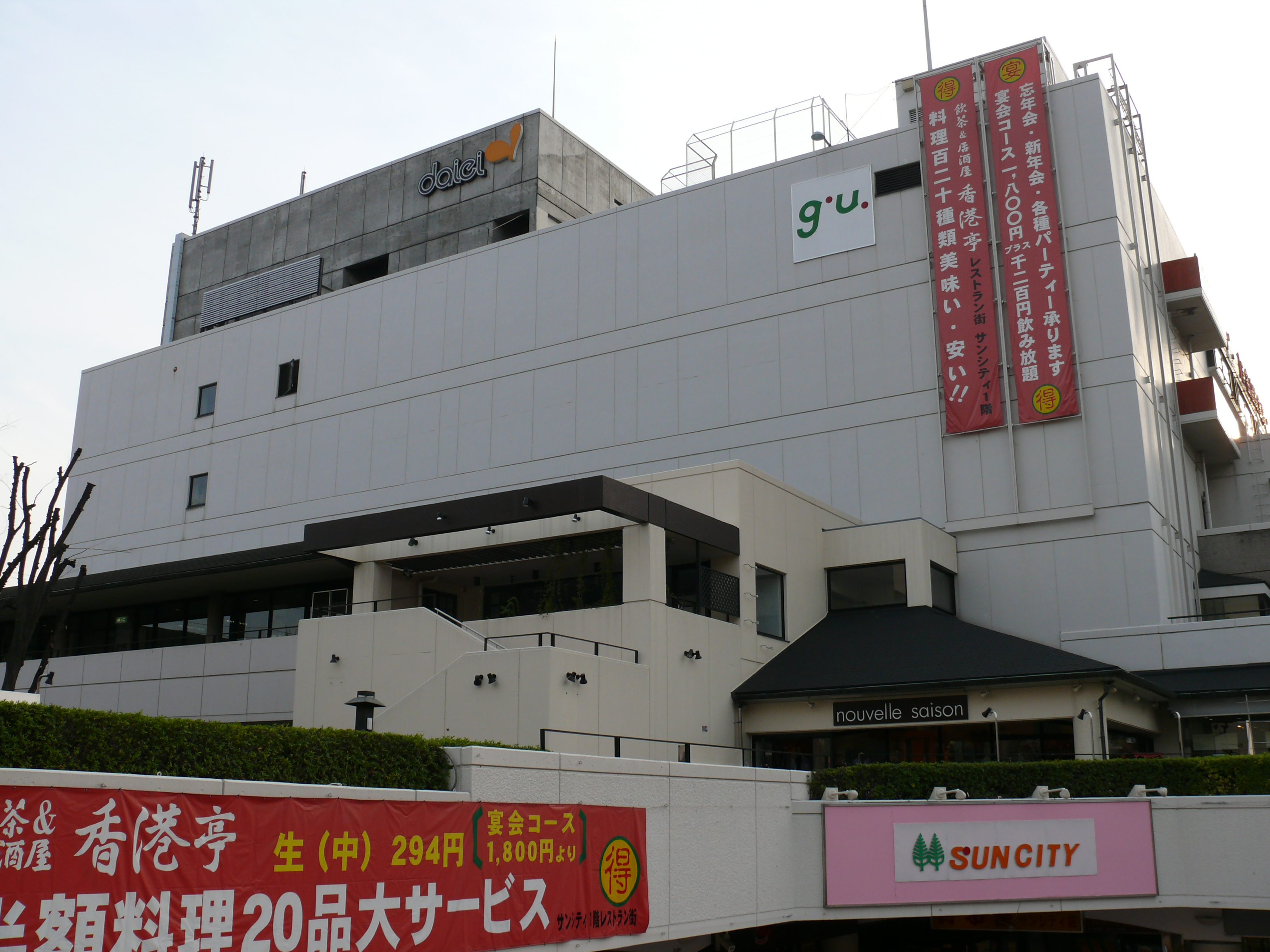 ダイエー南越谷店